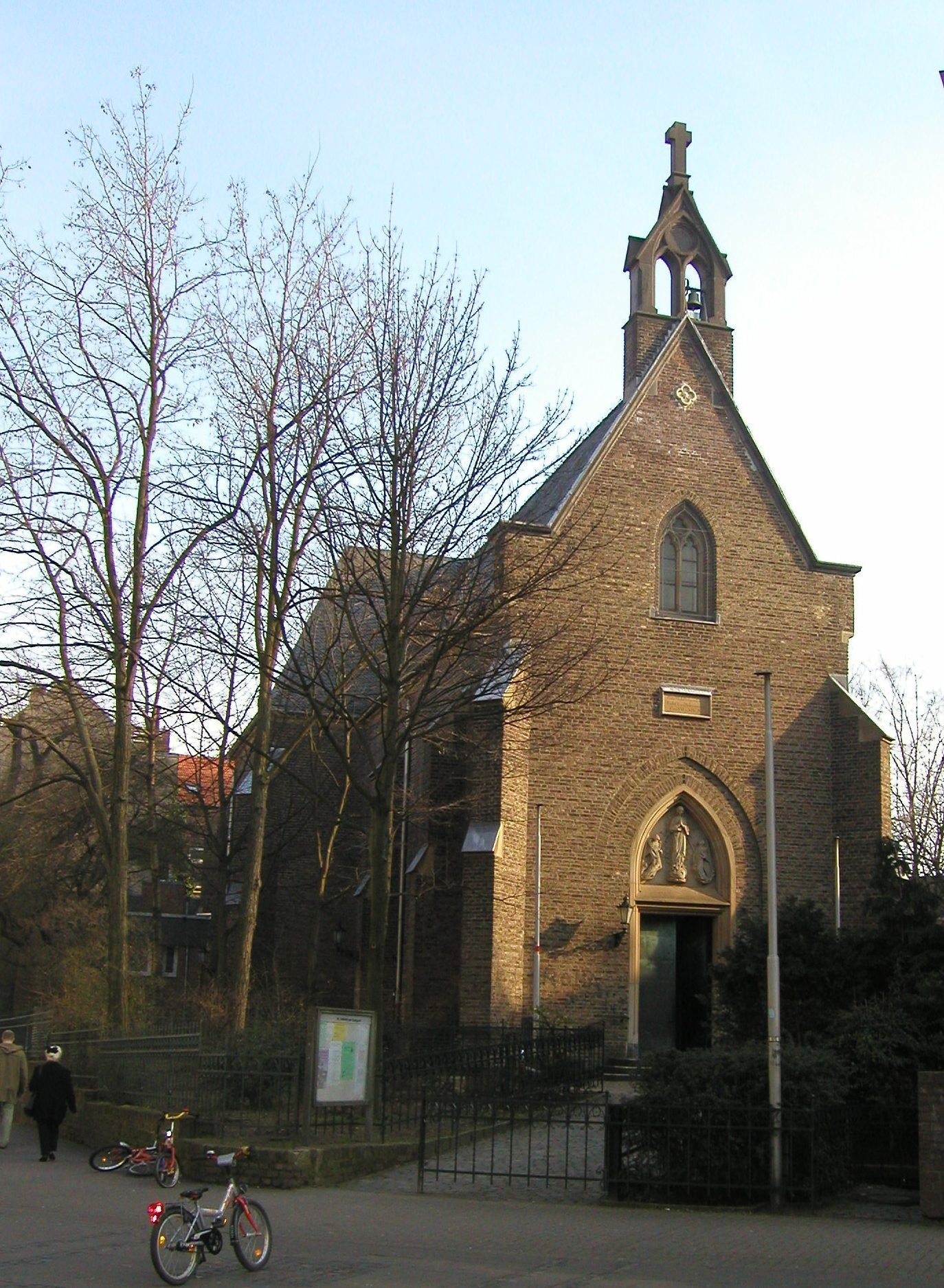 Kirche St. Heinrich und Kunigund in Köln-Nippes, D